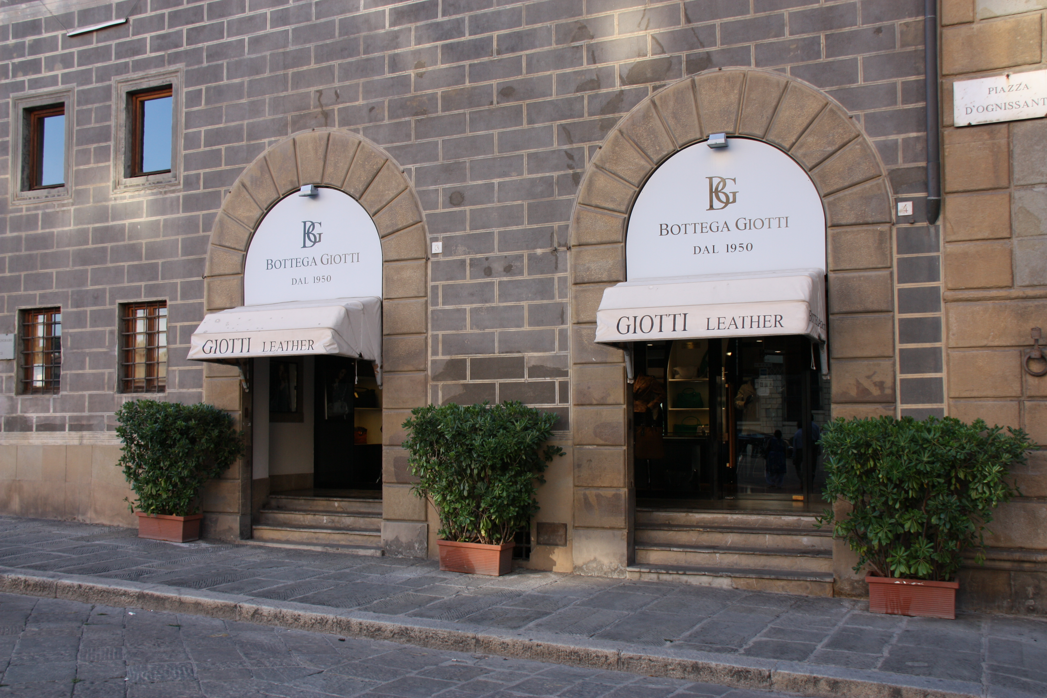 Бутик Bottega Giotti во Флоренции (Италия)